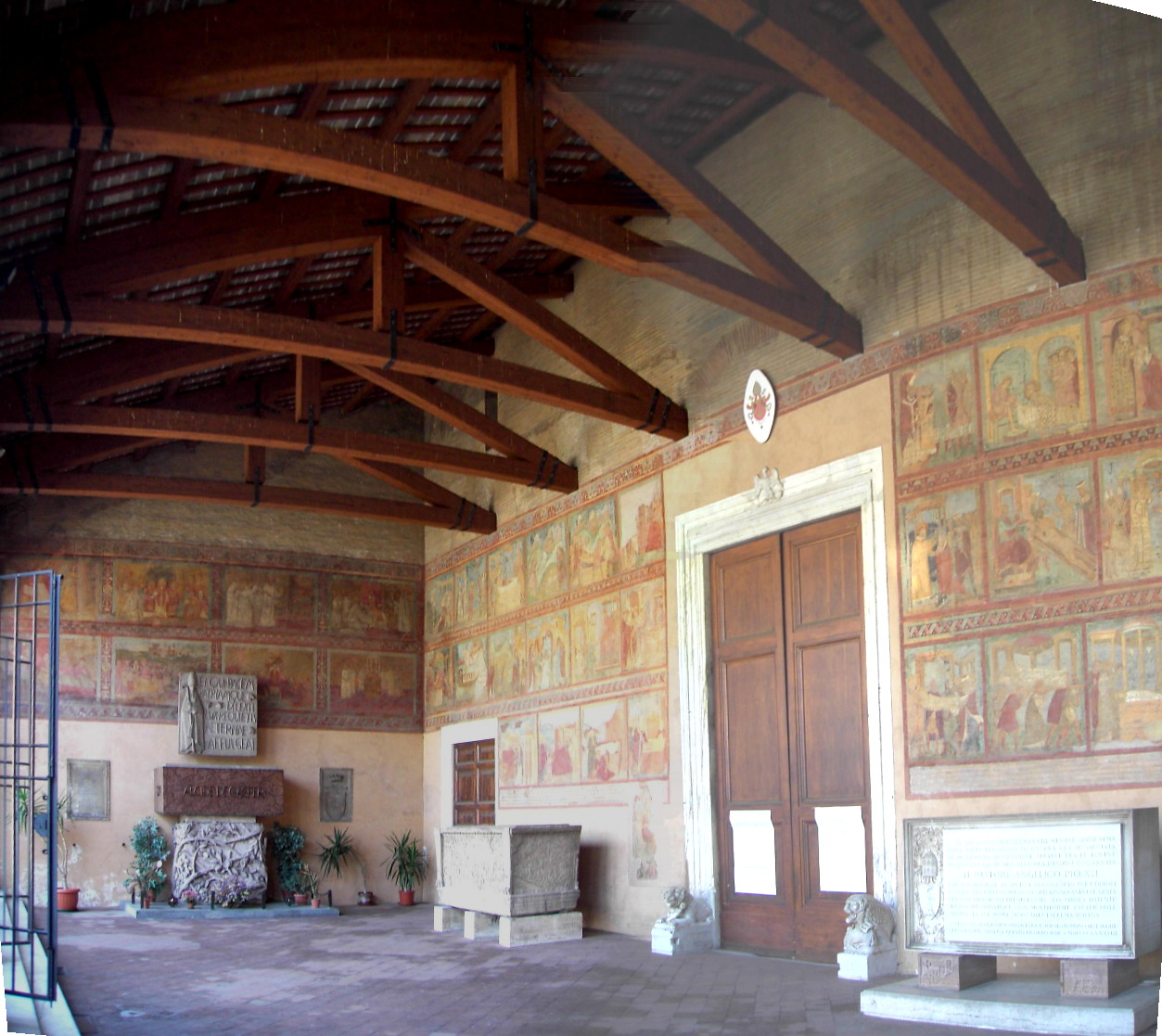 Roma , san Lorenzo fuori le mura: pronao